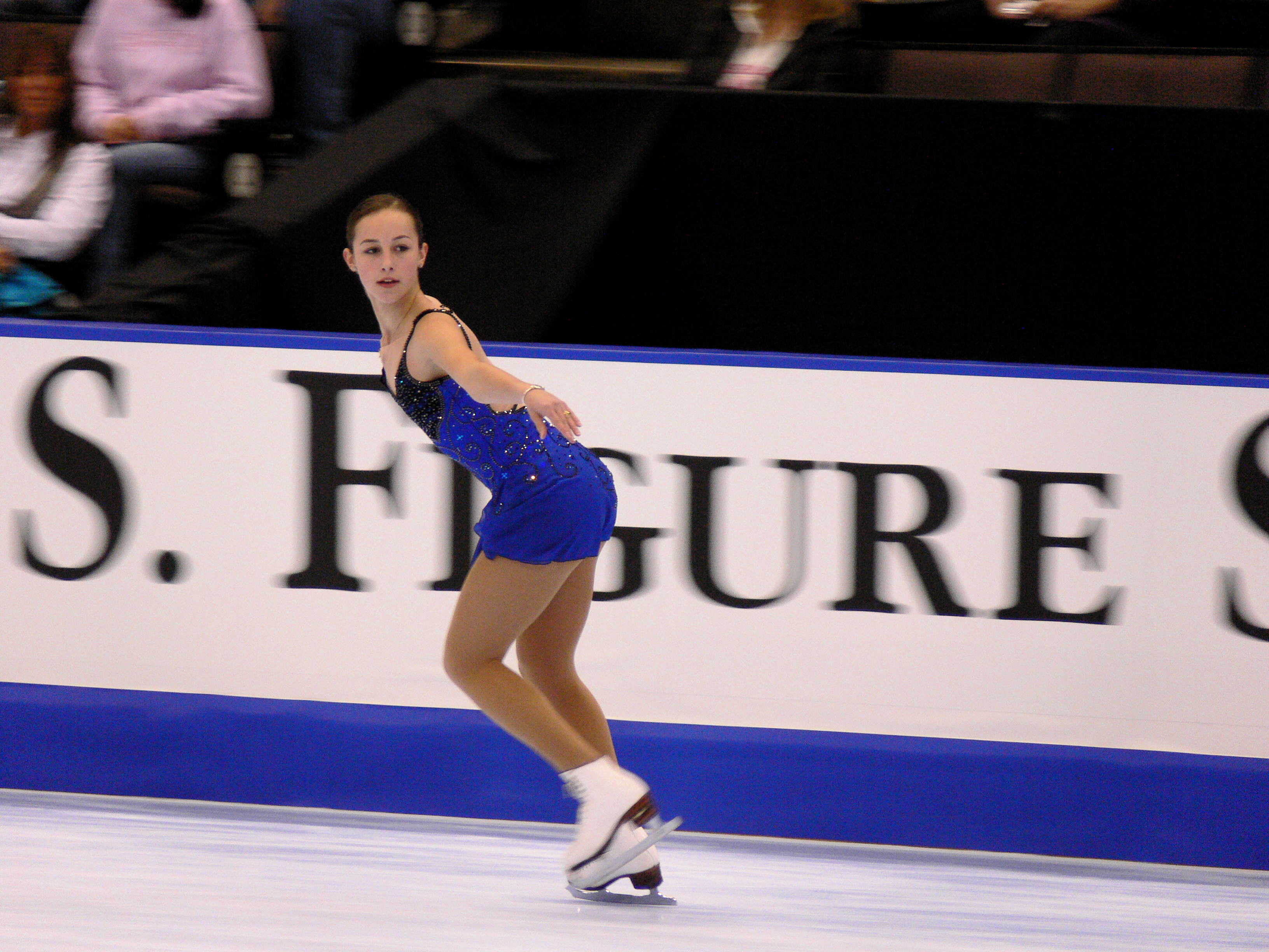 Kimmie Meissner